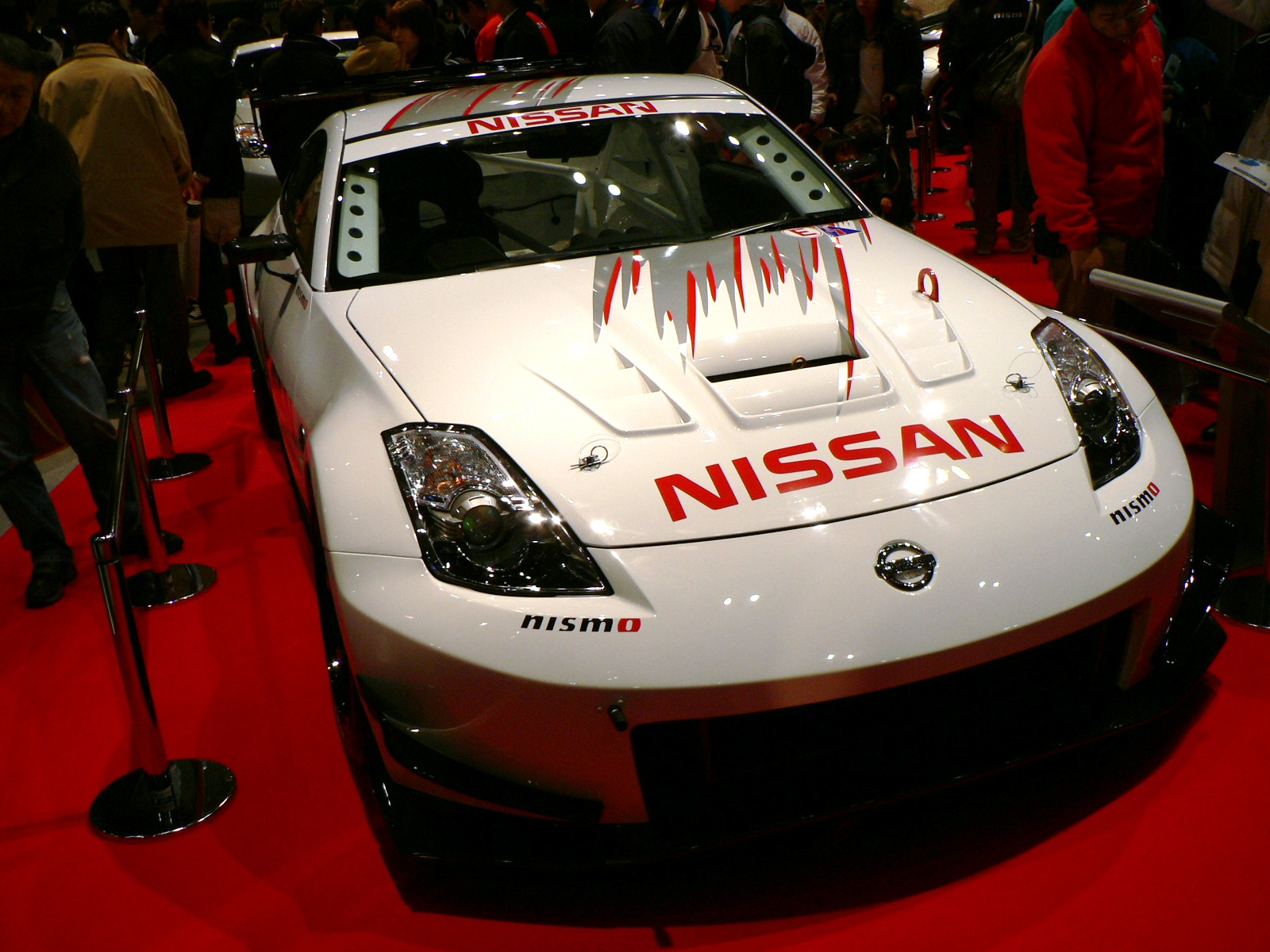 Z33 FAIR LADY Z Version NISMO 380RS-Conpetition Tokyo Auto Salon 2007